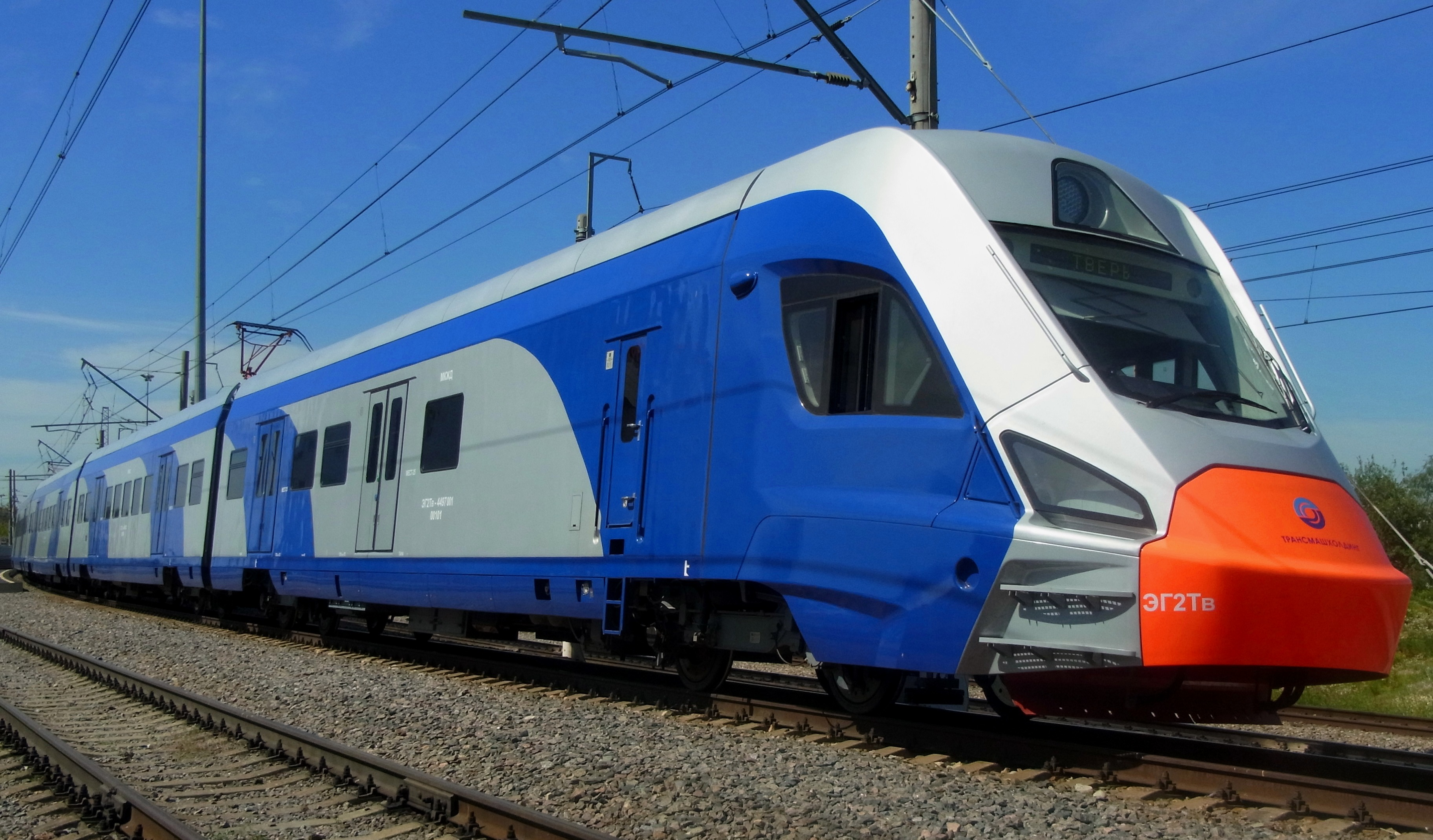 Электропоезд ЭГ2Тв-001 на платформе кольца ВНИИЖТ в Щербинке